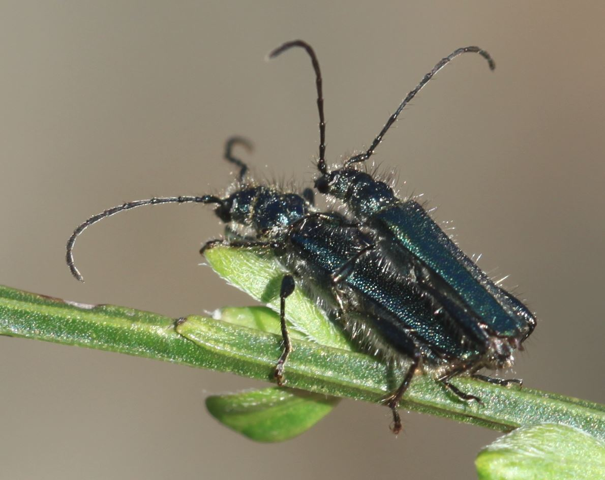 Schmaldeckenbock (Callimus angulatus), Paarung, am 18. April 2019 in der Schwetzinger Hardt